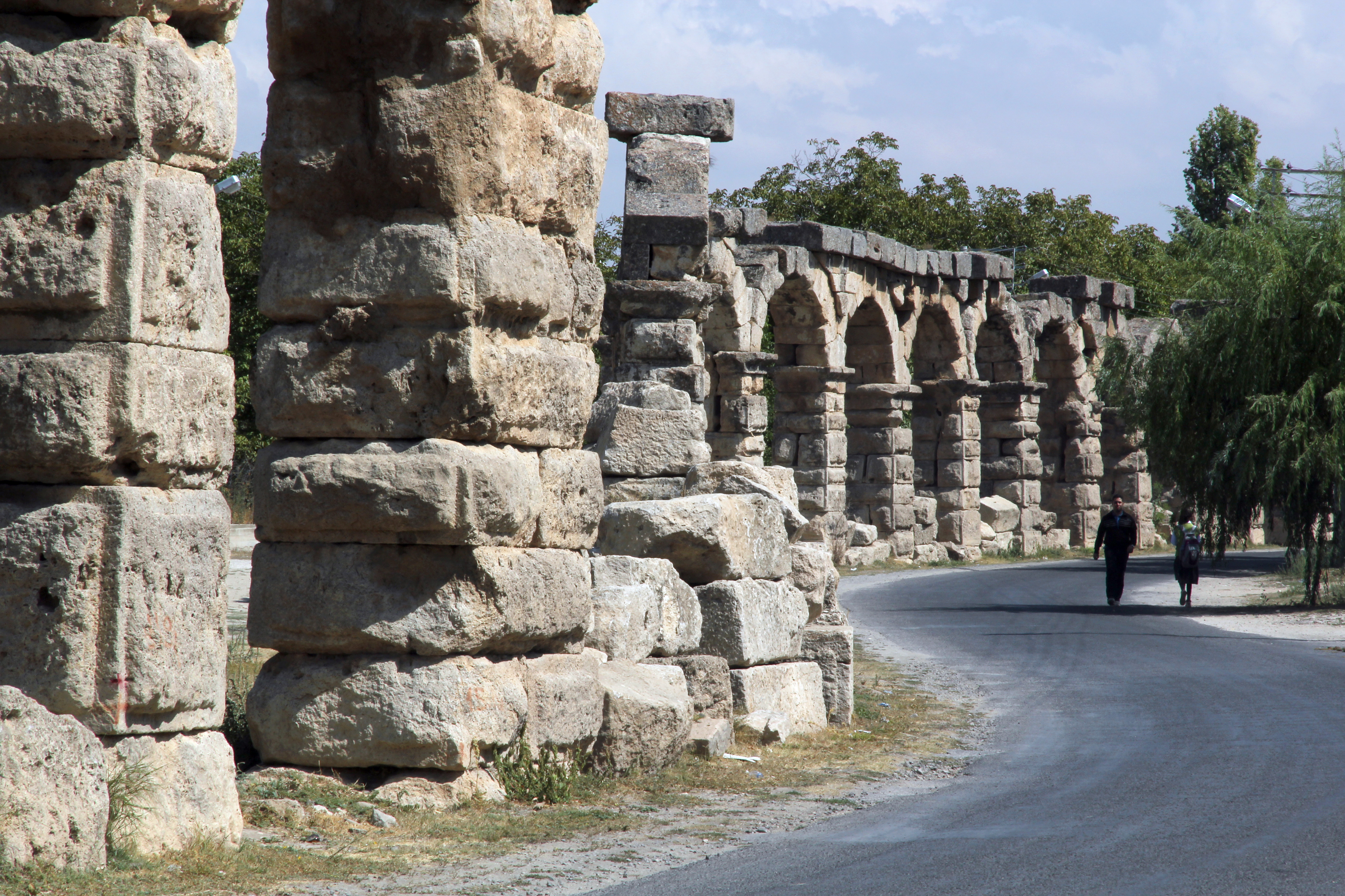 Tyana, römische Ruinen in Kemerhisar, Zentraltürkei, Aquädukt